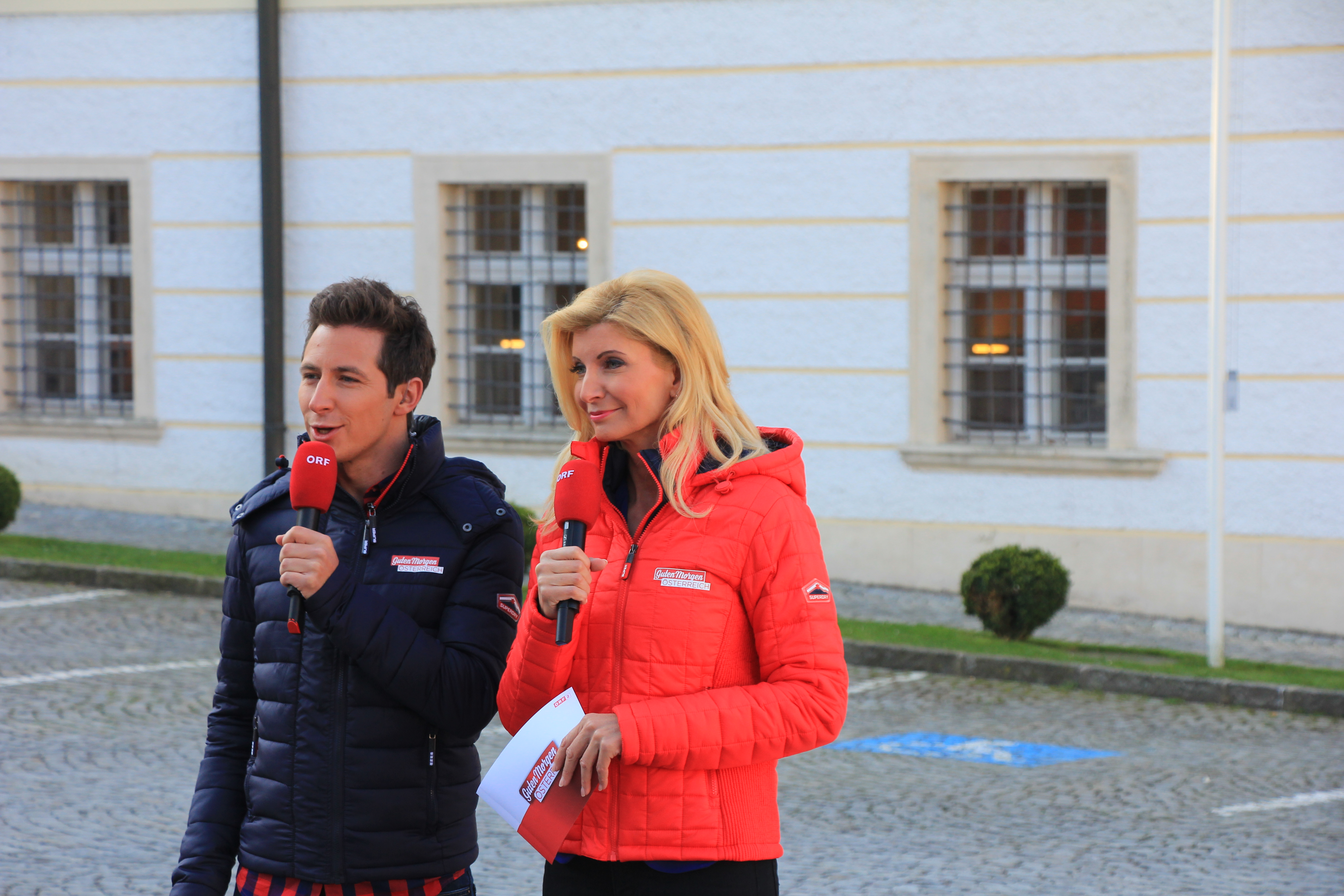 Übertragung der ORF-Sendung Guten Morgen Österreich vom Stift Heiligenkreuz in Niederösterreich